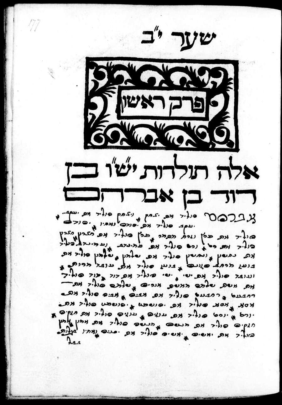 Pierwsza strona dzieła Szem Toba